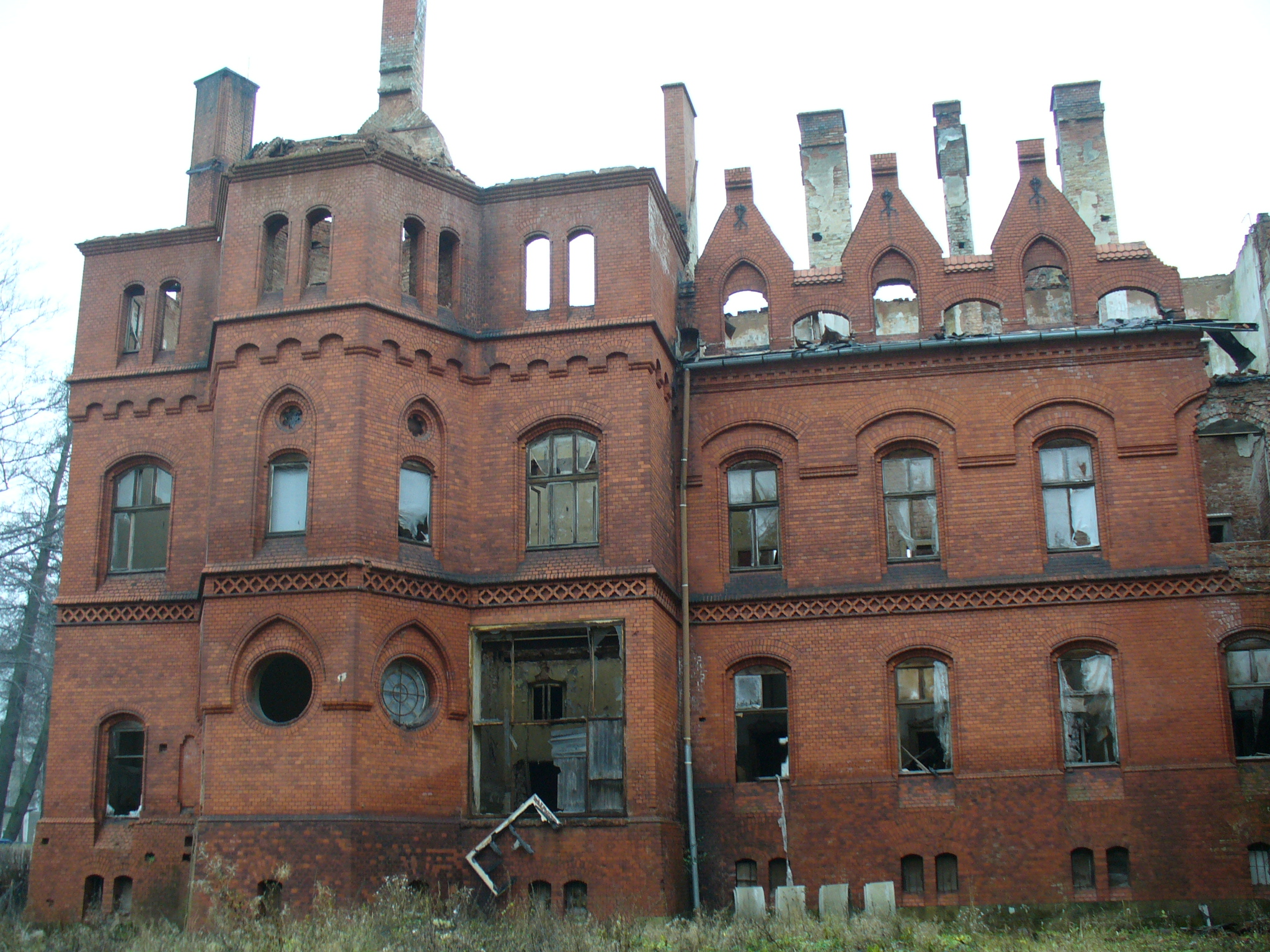 Sokołowsko, ul. Główna 4 - ruiny Sanatorium Grunwald